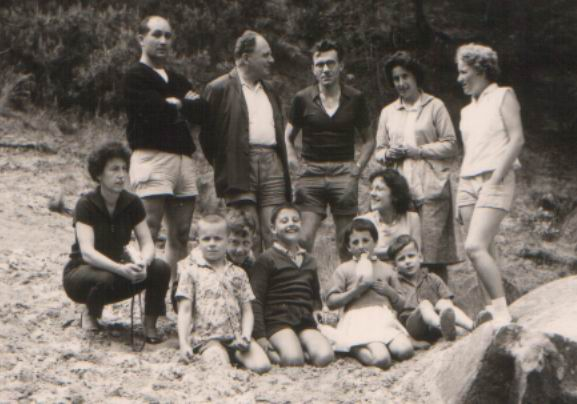 Semajnfino de pariza Sat-amikara grupo en Nemours en 1963. Starantaj: Remo Magnani, Norbert Barthelmess, Georges Lagrange, Juliette Ternant, ?. Kaŭrantaj: ?, Erika Lagrange. La infanoj: Bernard kaj Patrick Lagrange, Marc-Volito kaj Sylvie-Tamen Ternant, Arno Lagrange.